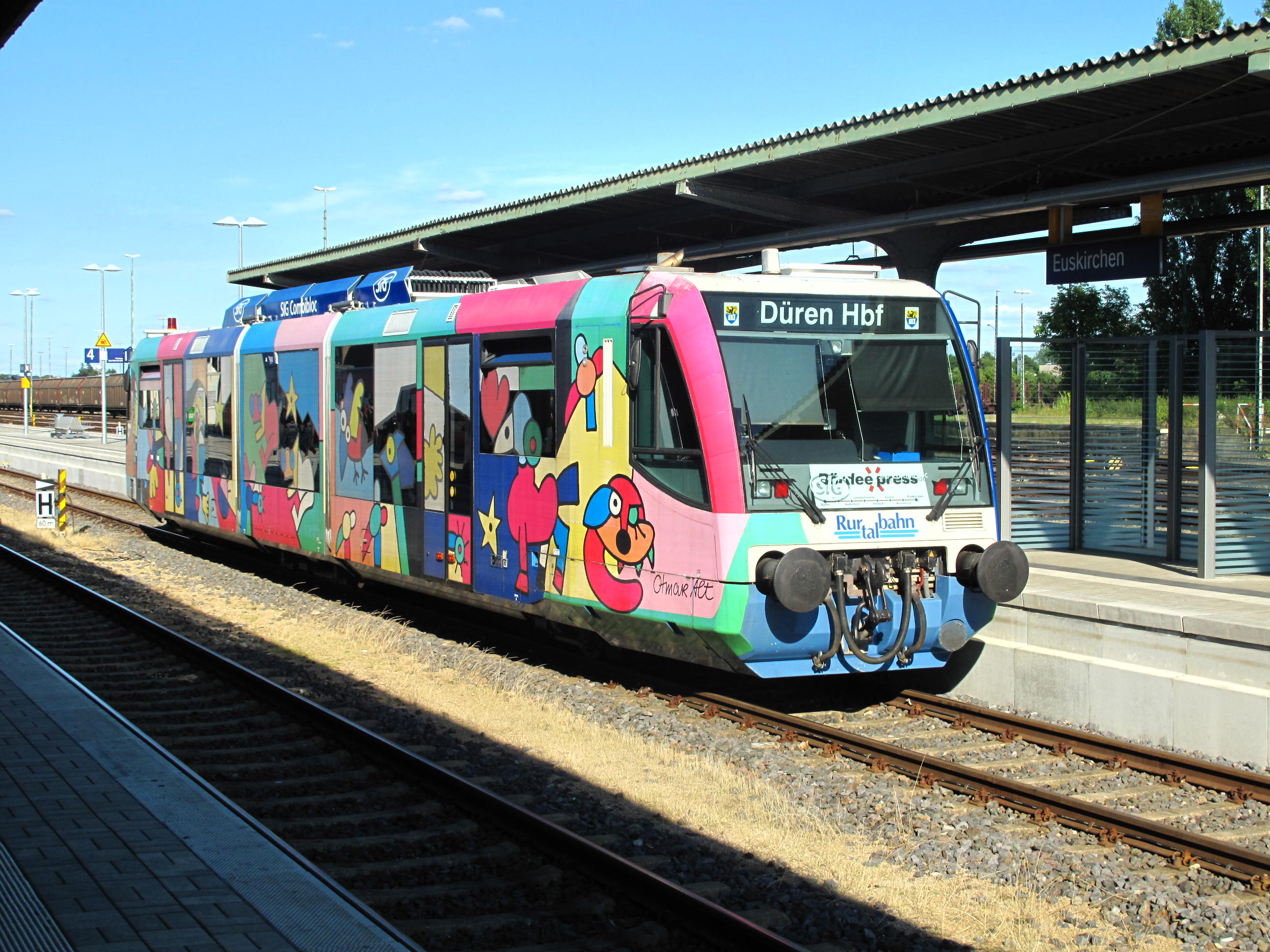 Der vom Künstler Otmar Alt gestaltete RegioSprinter der Rurtalbahn wurde in den 2010er-Jahren öfters für die Fahrten der Bördebahn Düren - Euskirchen eingesetzt, welche damals nur an Wochenenden im Sommer befahren wurde. Die letzten RegioSprinter verließen im Februar 2019 den Kreis Düren auf dem Weg zu ihrem neuen Einsatzgebiet in Tschechien.